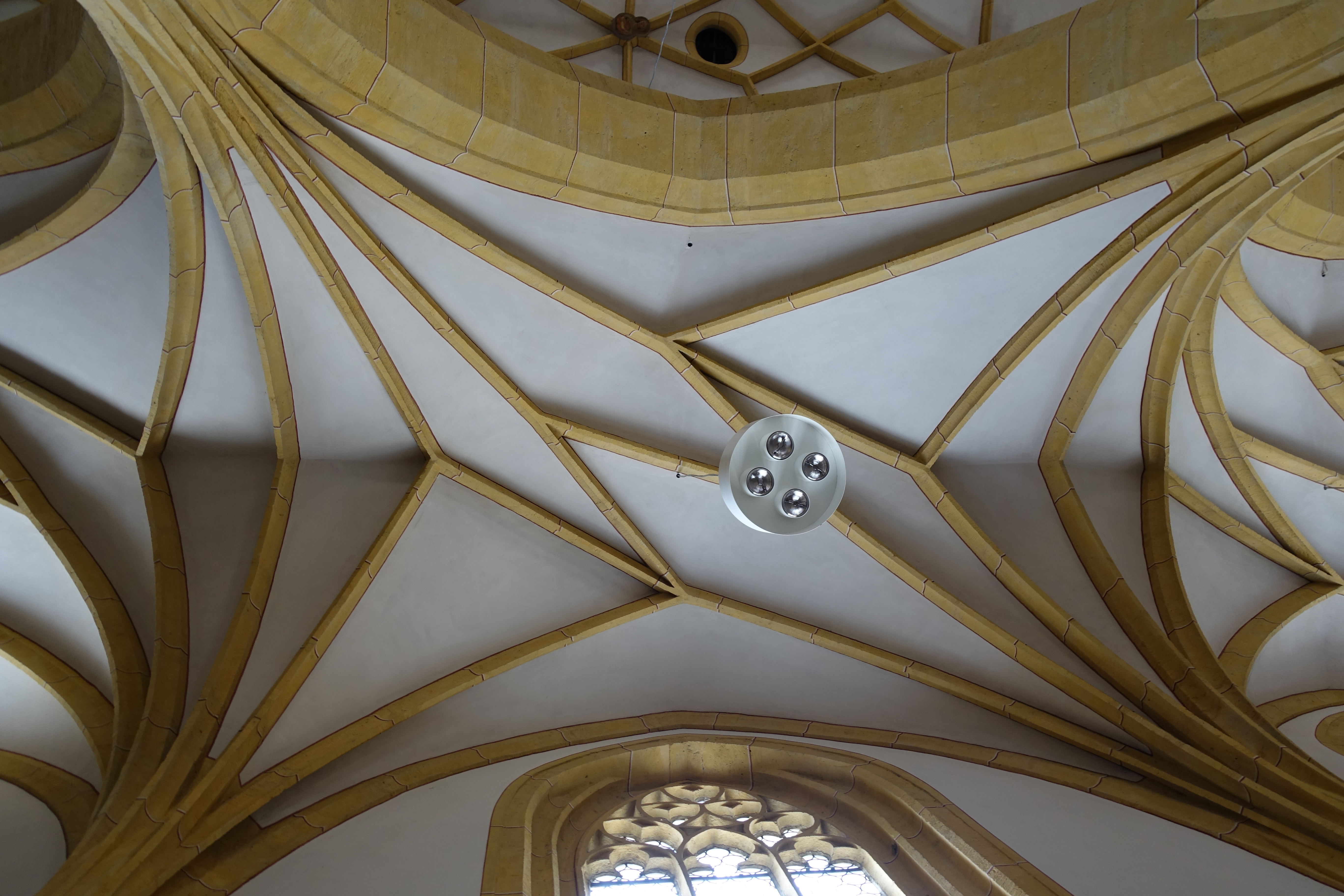 Landeck, Tirol, Österreich. Katholische Pfarrkirche Mariä Himmelfahrt, Seitenschiffgewölbe